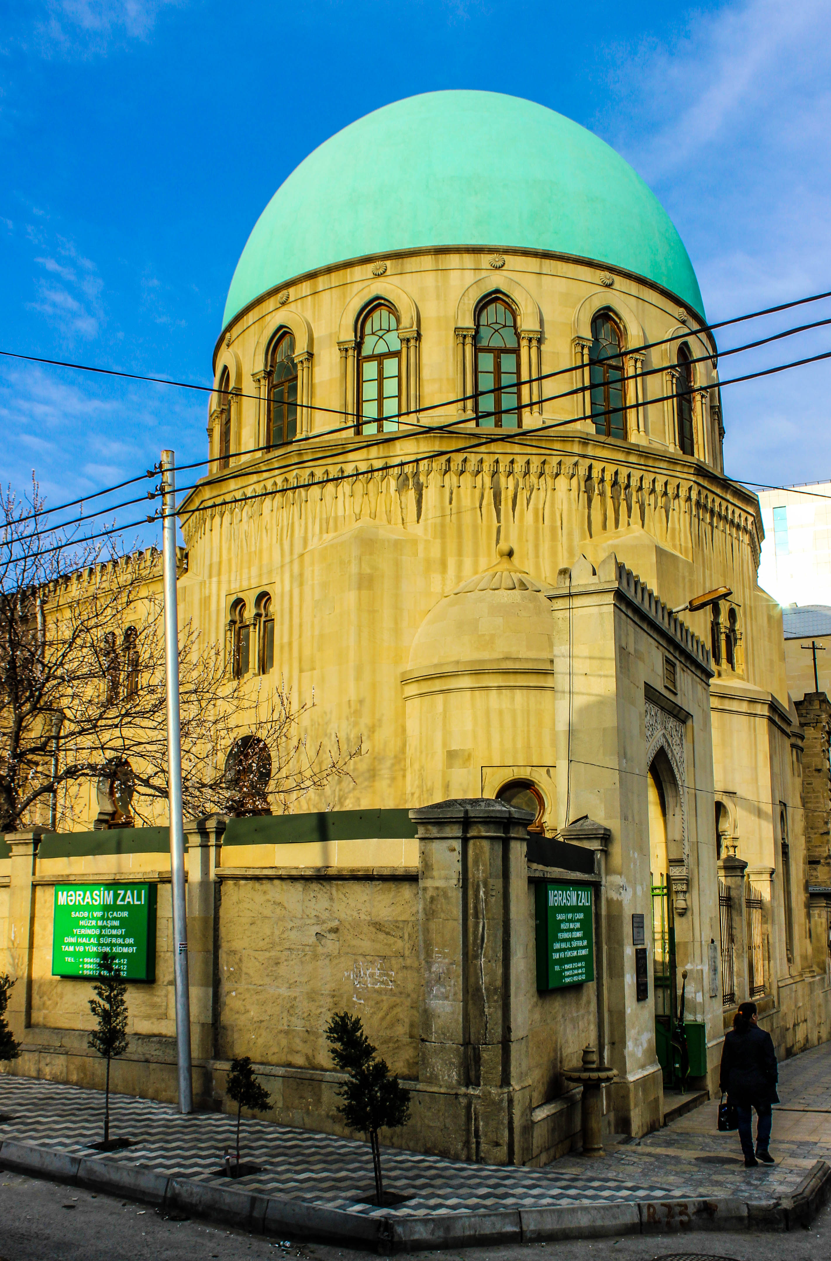 Hacı sultanəli məscidi, memar Ploşko